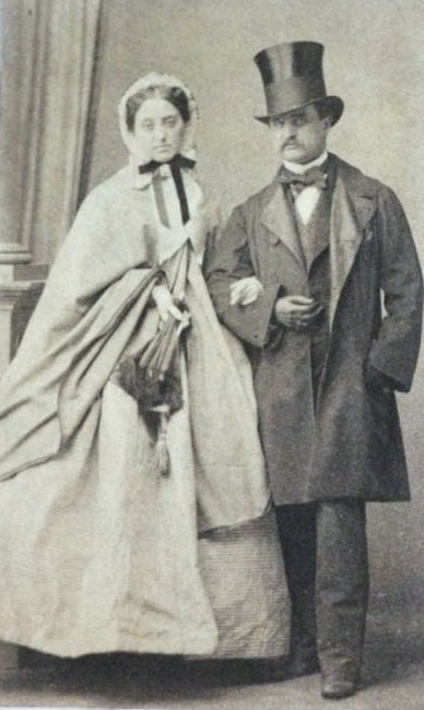 Граф Владимир Иванович Мусин-Пушкин и его жена Варвара Алексеевна